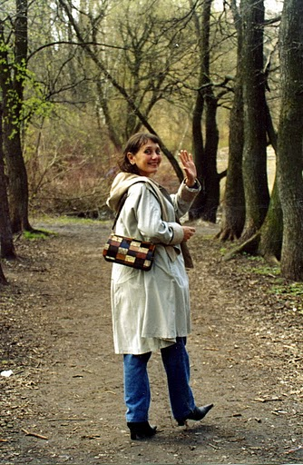 Мама прощается